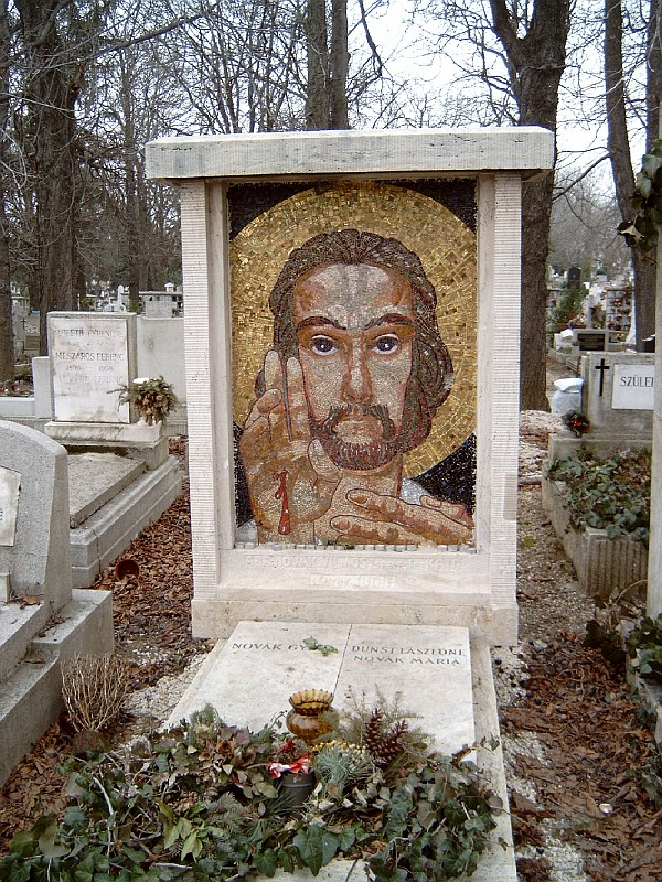 Le tombeau du Vilmos Aba-Novák au Budapest dans la cimetiere du Farkasrét.